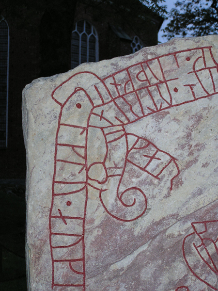 Sö280